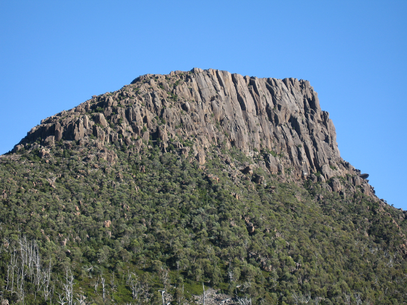 Mt Ragoona close up